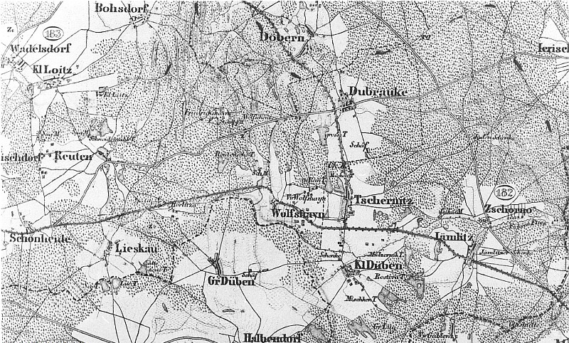 Original image description from the Deutsche Fotothek Jämlitz-Klein Düben-Klein Düben. Topographische Karte vom Preußischen Staate, Blatt 234 Muskau, aufgen. 1846, Nachträge 1867